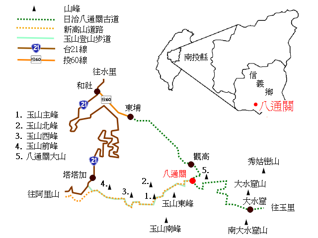 八通關位置圖